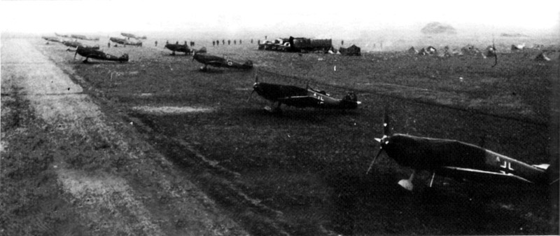 Garnizon Praschnitz (Przasnysz),1941r. Niemieckie samoloty na lotnisku